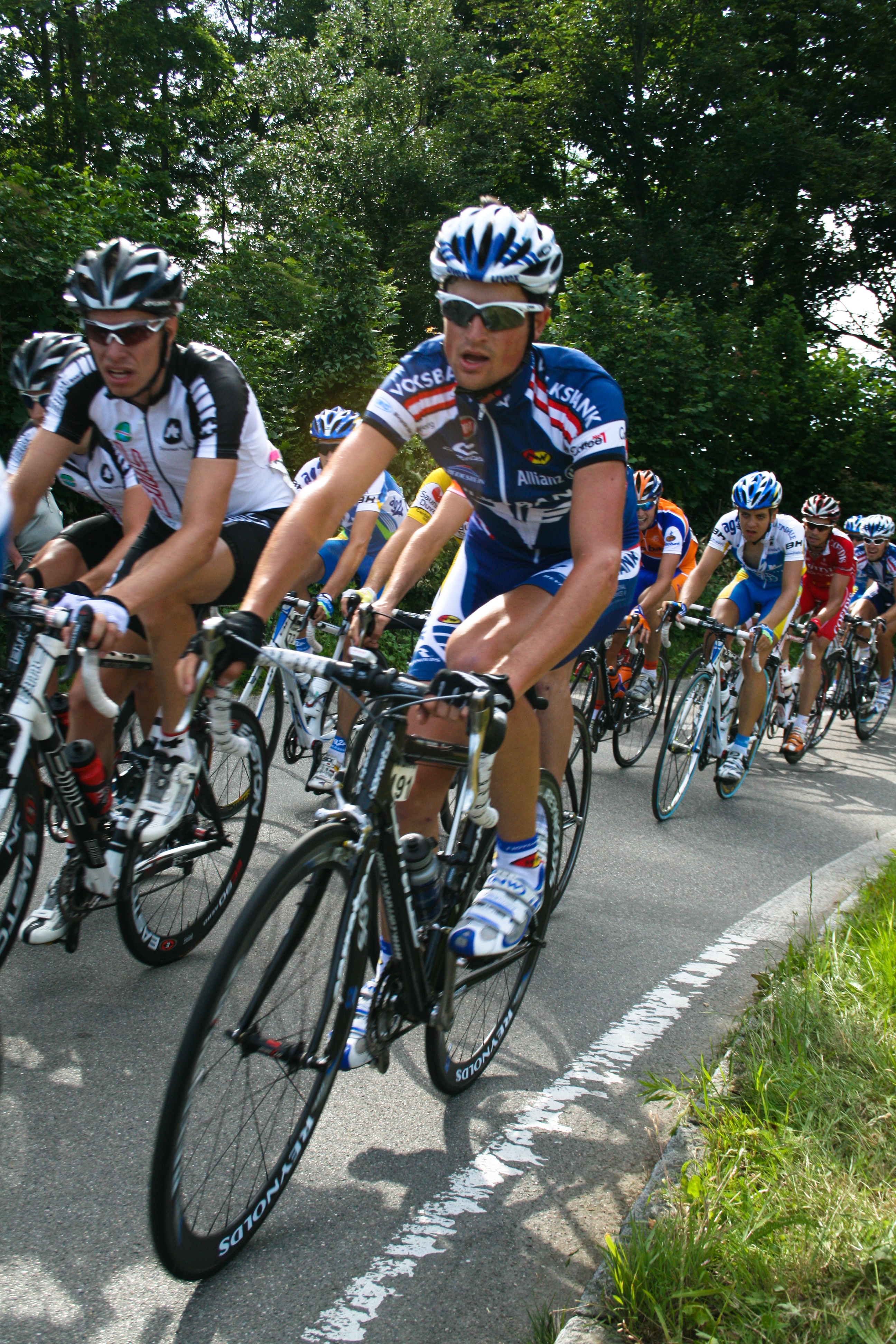 Andreas Dietziker au cours de la 7ème étape du Tour de Suisse 2008, Gruyères-Lyse.